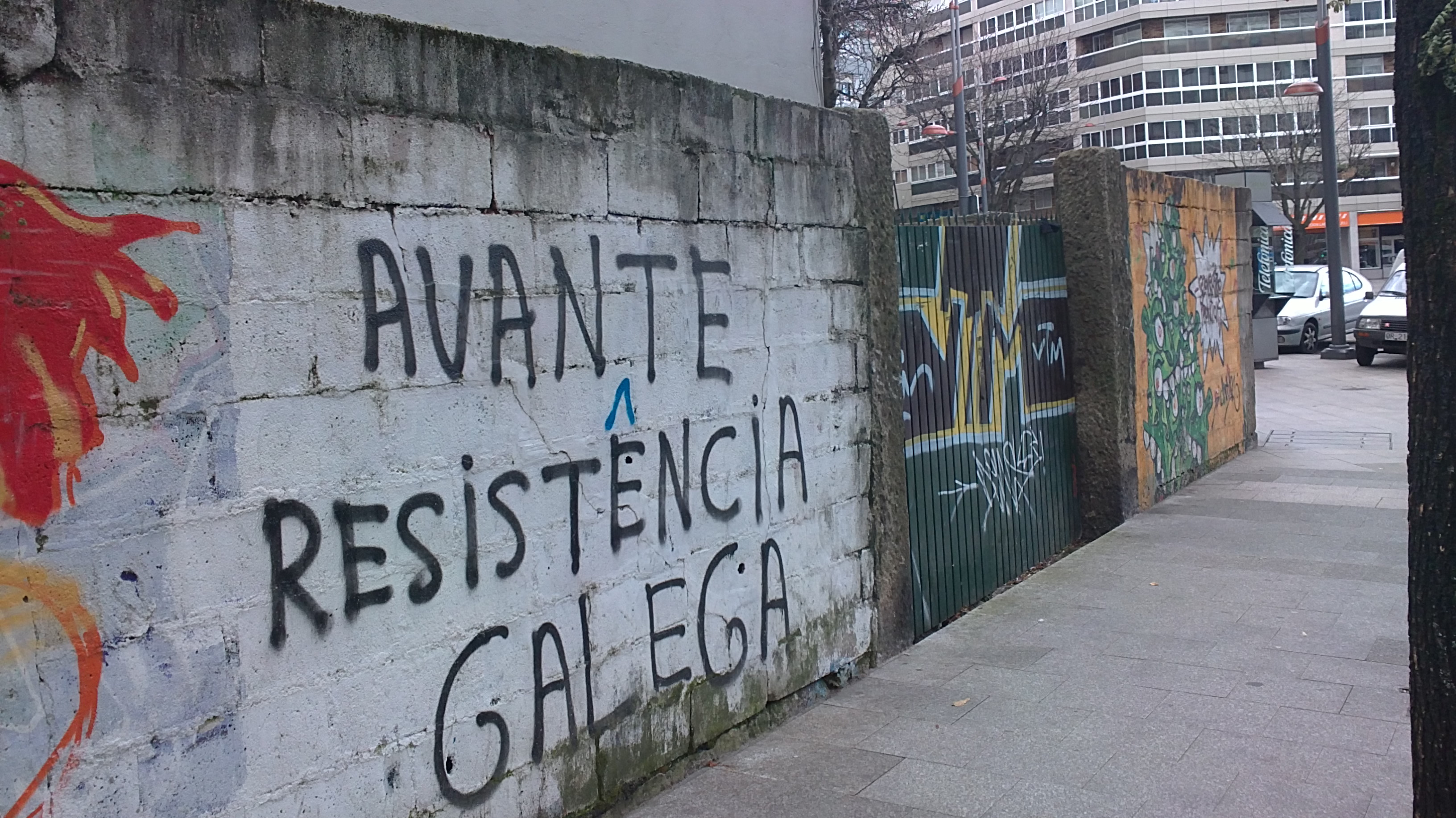 Pintada a favor de Resistência Galega na rúa Torrecedeira na cidade de Vigo